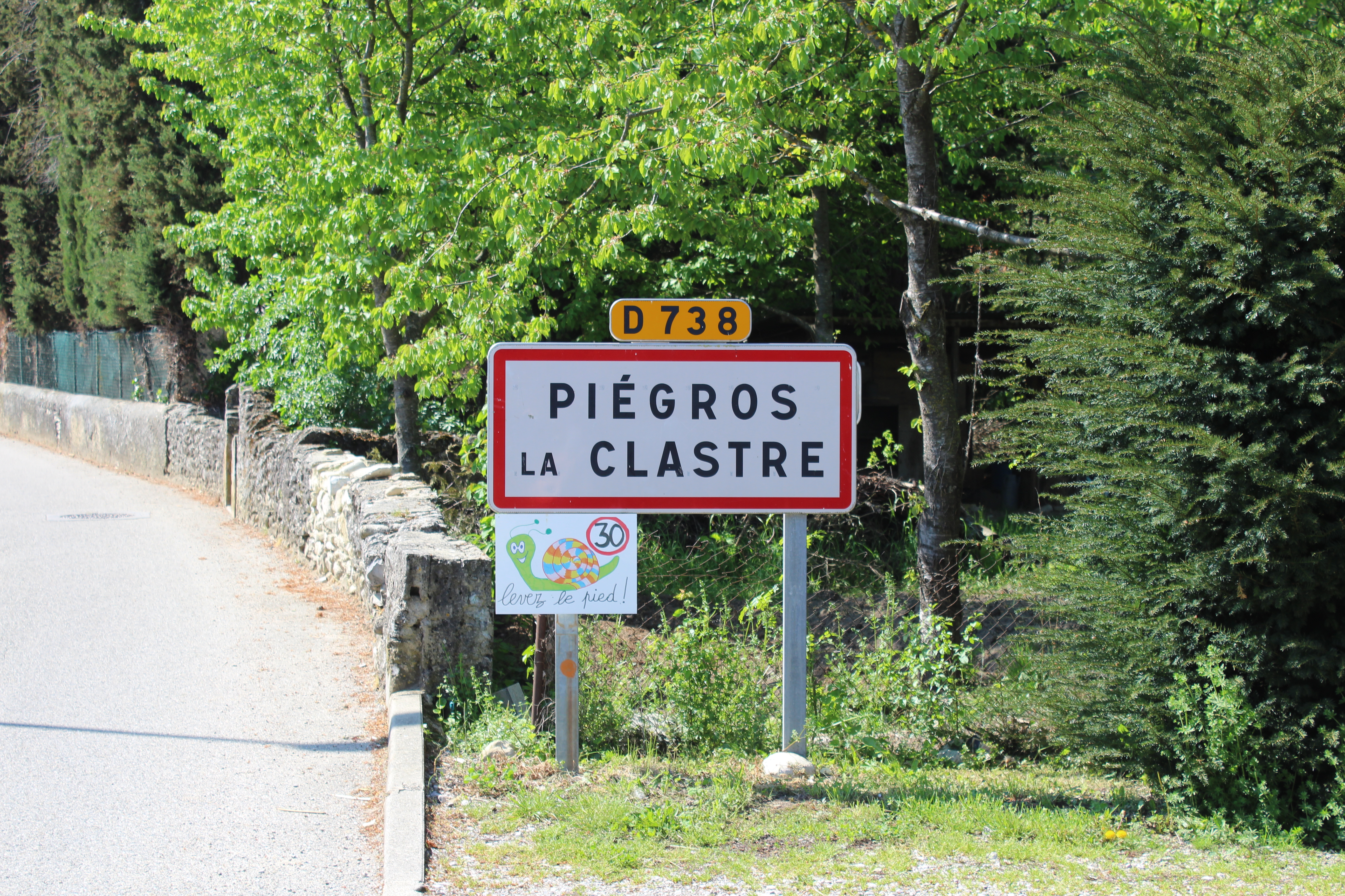 Photographie du panneau de Piégros-la-Clastre